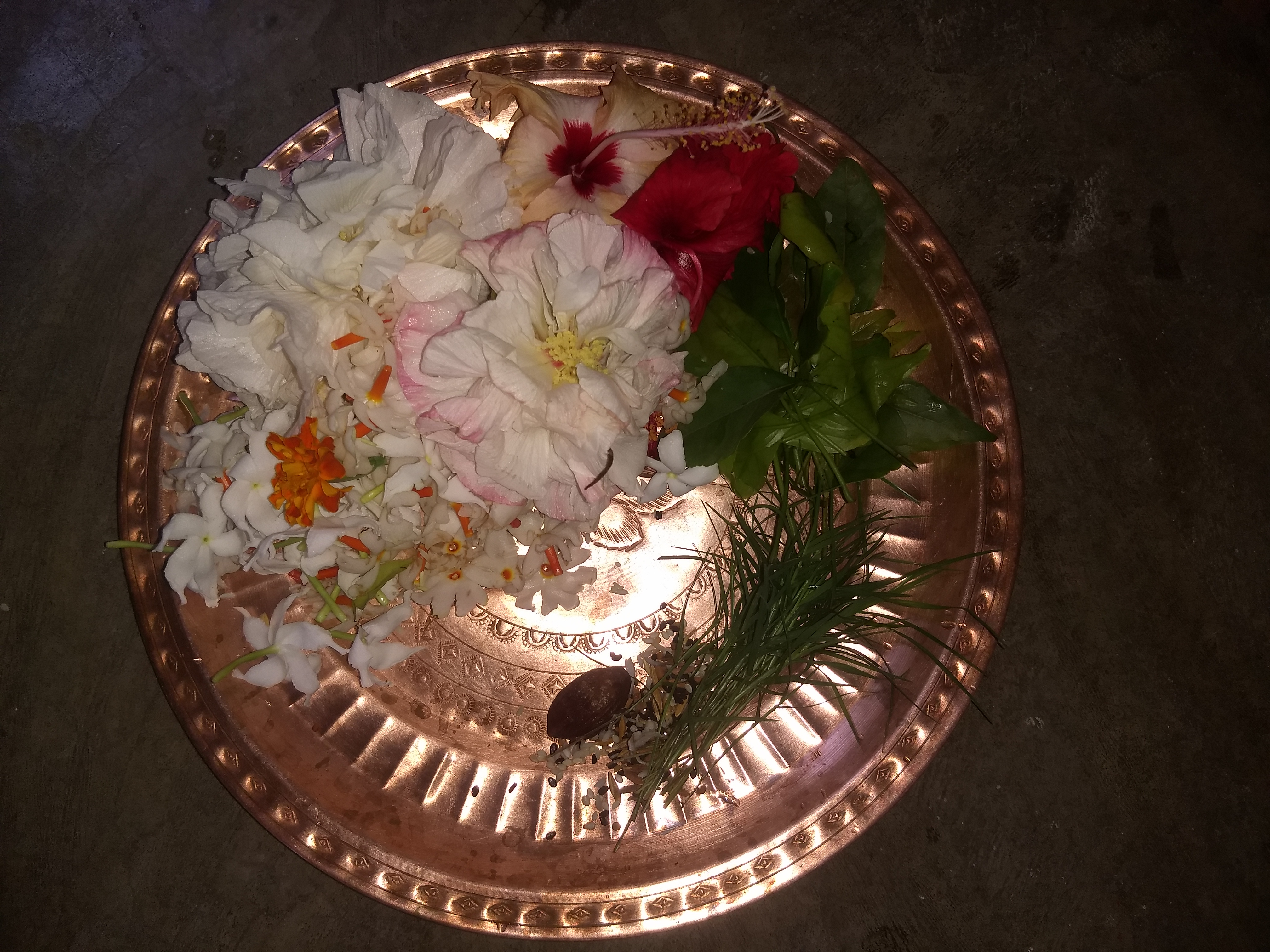 হিন্দু পূজার অন্যতম উপকরণ হলো পুষ্পপাত্র। এটি মূলত তামার হয়ে থাকে।